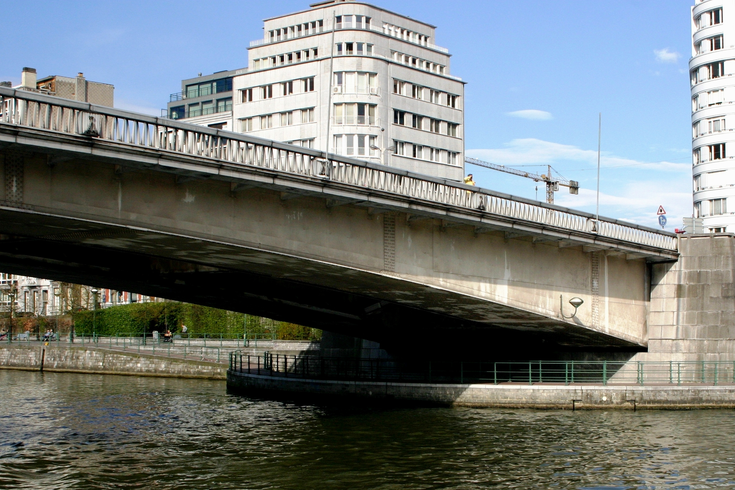 Pont Albert 1er zu Léck rietsen Opleeër. Kategorie:Brécken an der Belsch